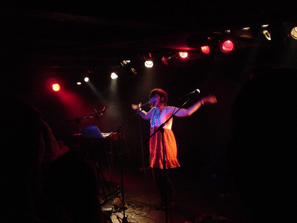 Soko playing at Loppen in Copenhagen.